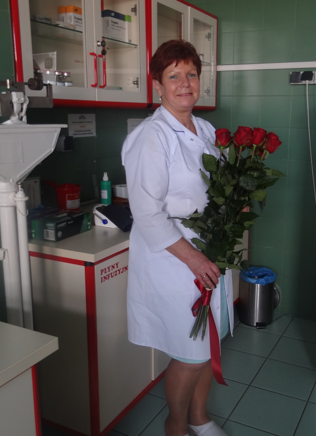 Oddziałowa położnictwa, ginekologii i neonatologii Maria Szelkowska